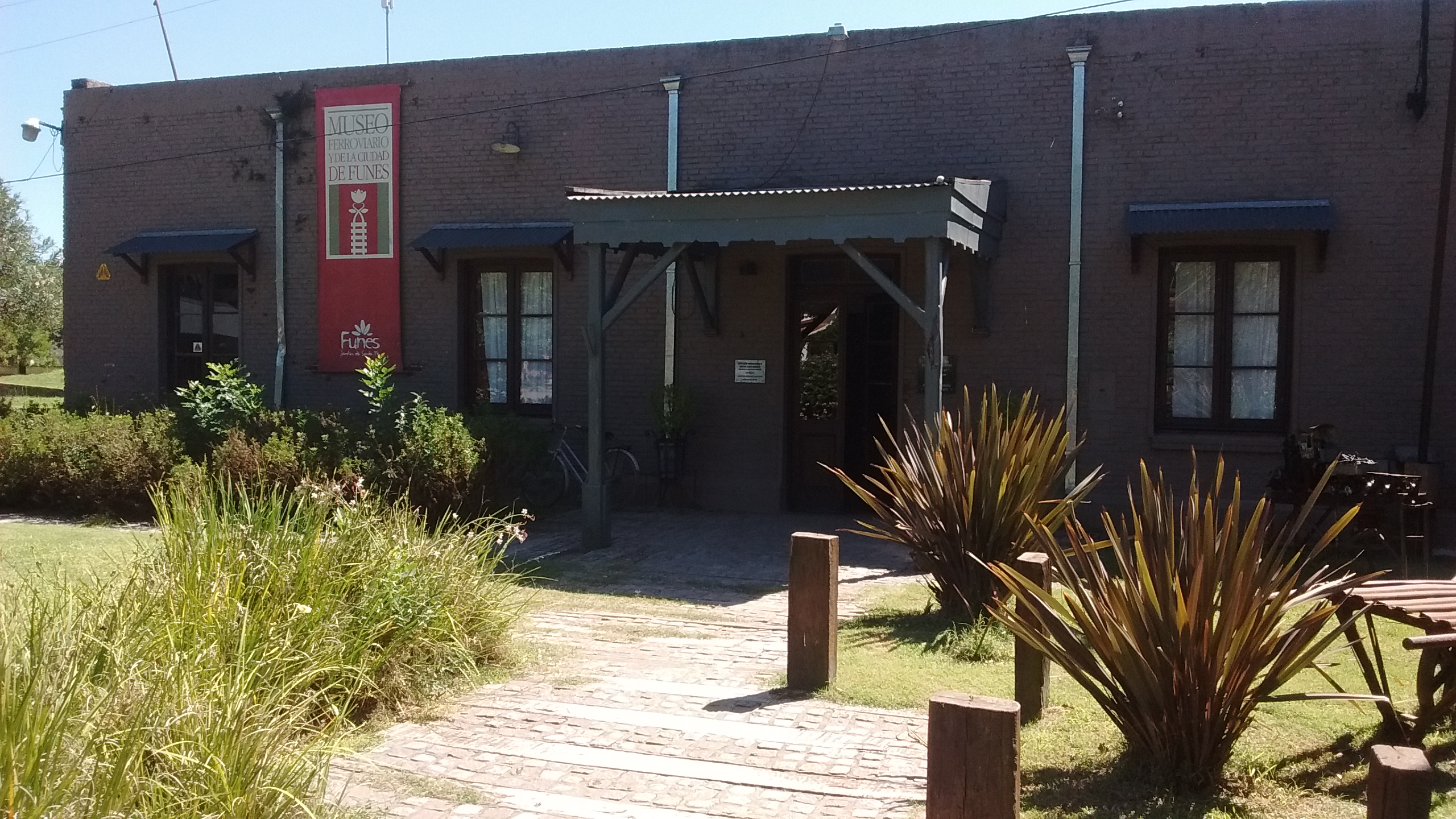 Vista de la entrada al Museo Juan Murray (ex estación Funes)